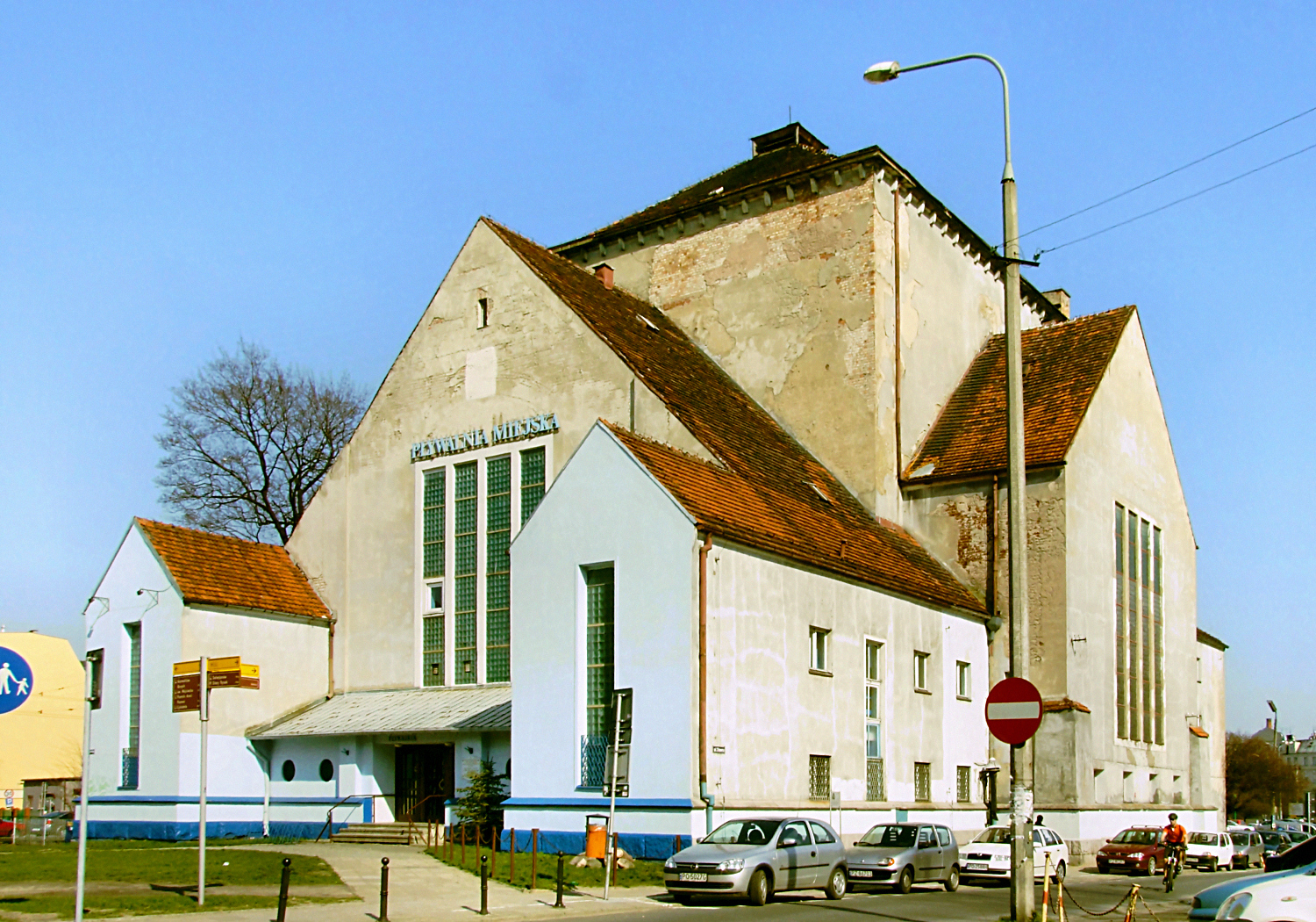 Poznań, dawna synagoga (1907); Poznań, former synagogue (1907)